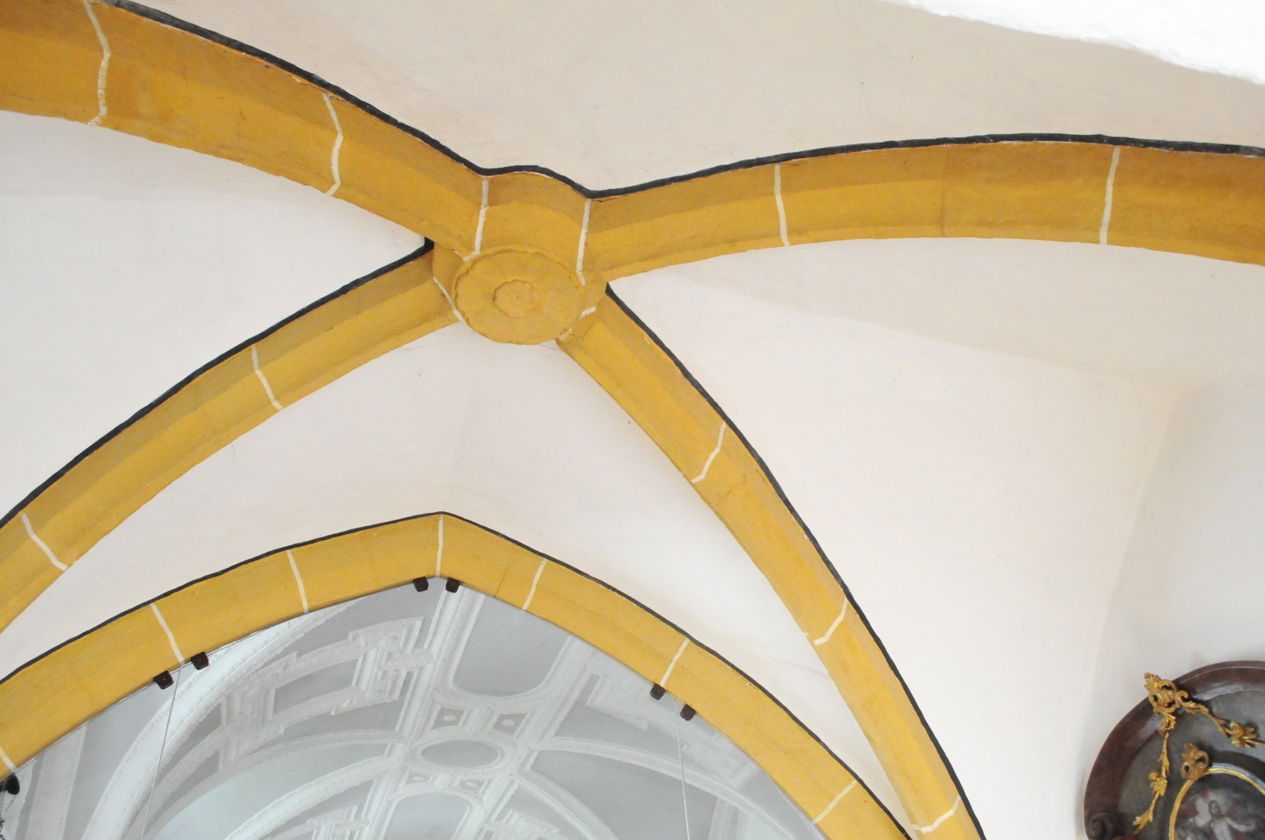 Evangelische Elisabethkirche Murau, Kreuzrippengewölbe in der Eingangshalle unter dem Turm